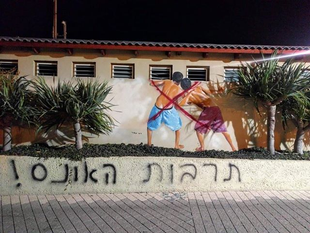 פעילות התנועה הפמינסטית 'לוט"ם - היחידה ללוחמה בטרור מגדרי' השחיתו את ציורו האייקוני של רמי מאירי בחוף מציצים, המציג שני גברים המציצים למקלחות הנשים, במחאה על תרבות האונס שהוא מייצג.